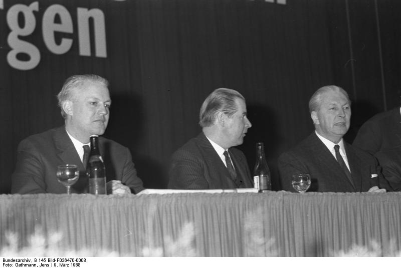 14. Bundestagung des Ev. Arbeitskreises der CDU/CSU Stuttgart, Liederhalle